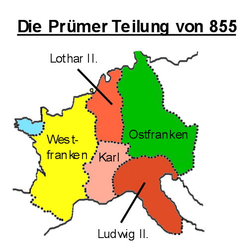 Teilung von Prüm, erstellt von Benutzer:Rdb.